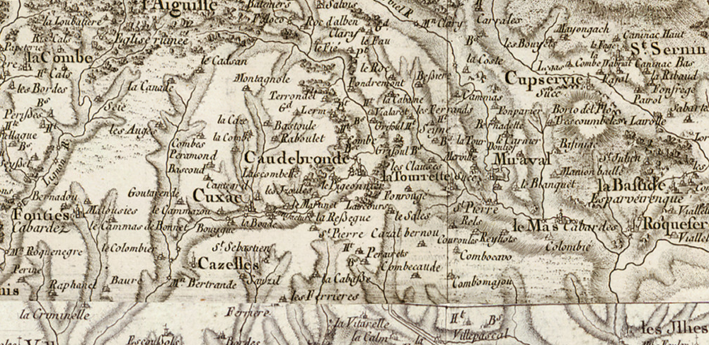 Extrait d'une carte de Cassini présentant la région du Cabardès avec les noms de communes, paroisses, succursales de paroisses, hameaux , lieux-dits notamment La Tourrette